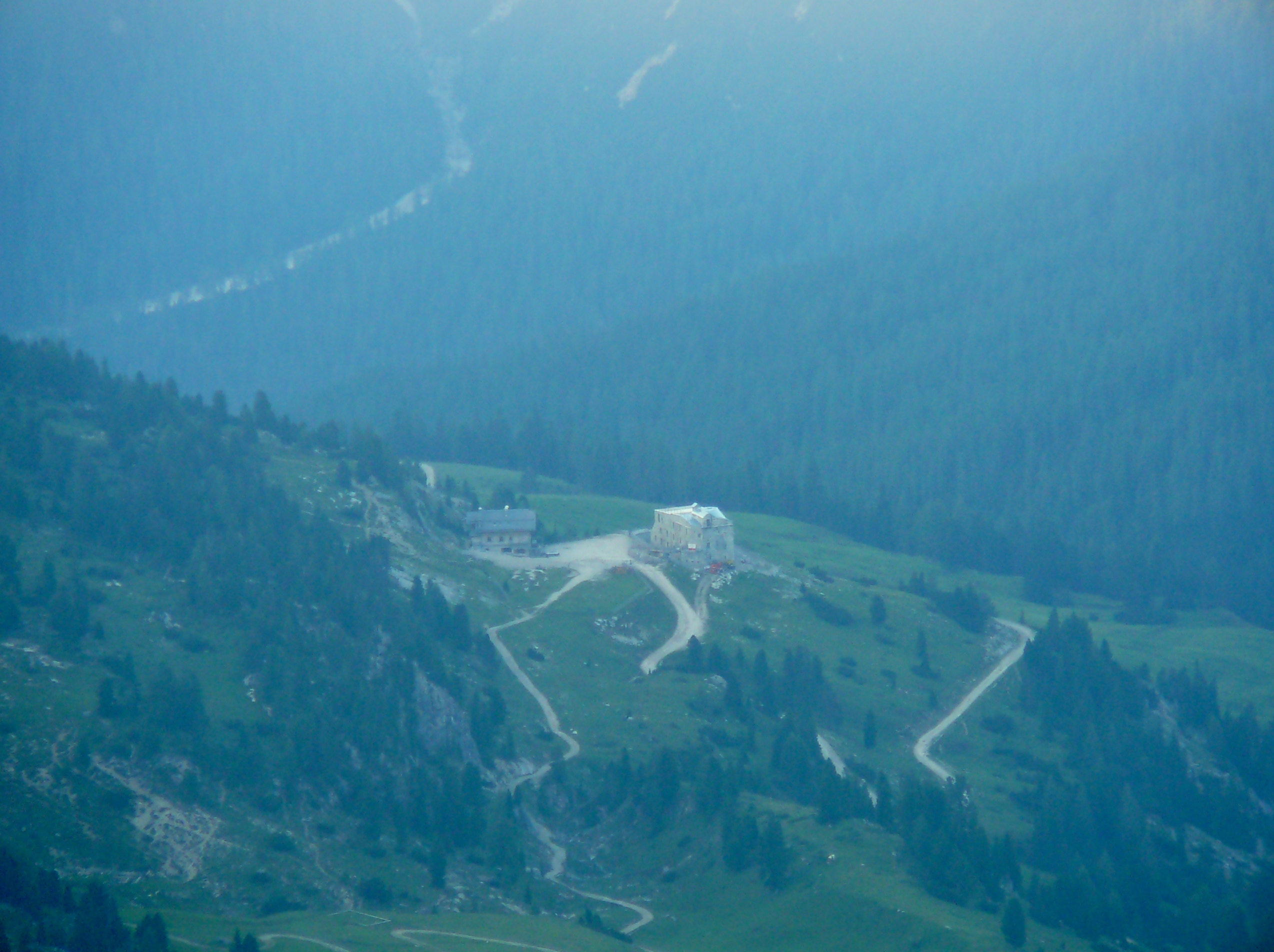 Rifugio Vallandro e Forte Prato Piazza dal sentiero n. 40